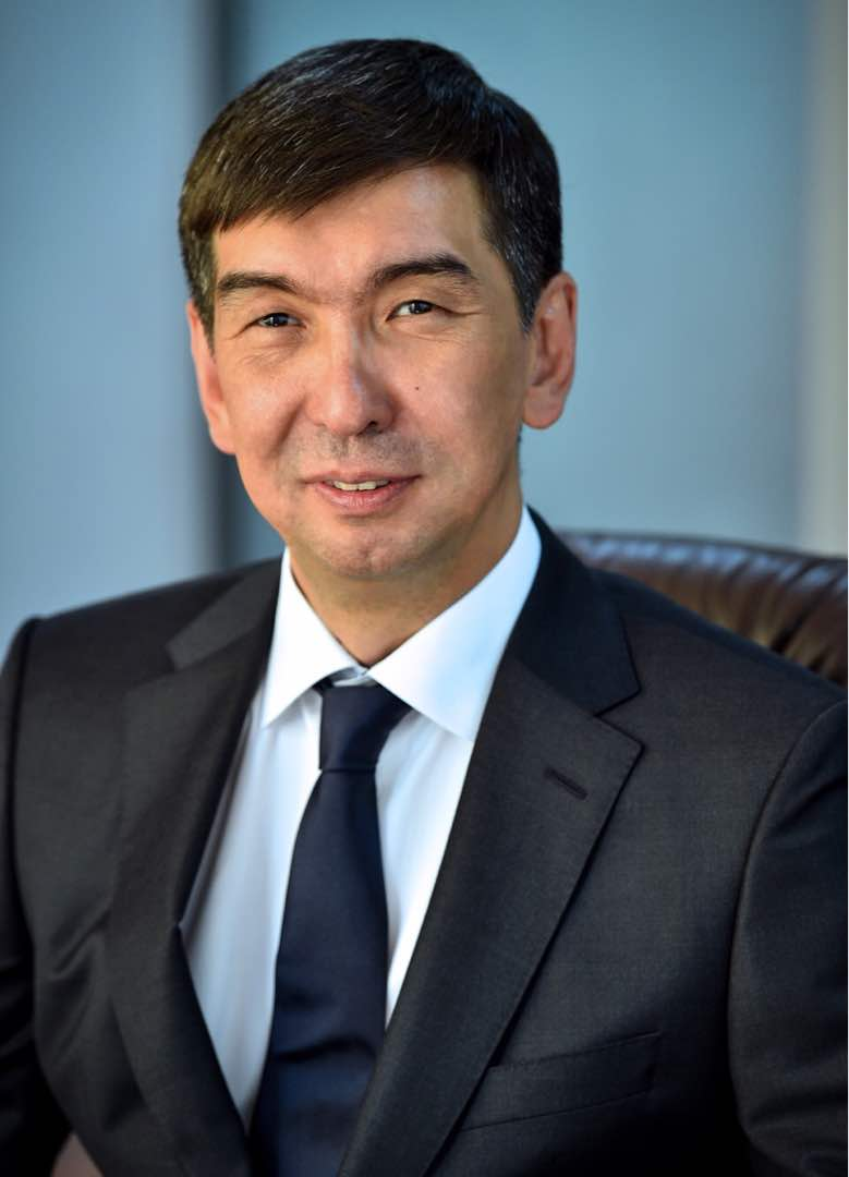 Суракматов Азиз Эмильбекович Депутат Жогорку Кенеша Кыргызской Республики с 2010